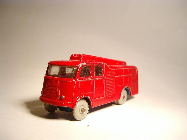 Best box No 503 DAF Brandweer.